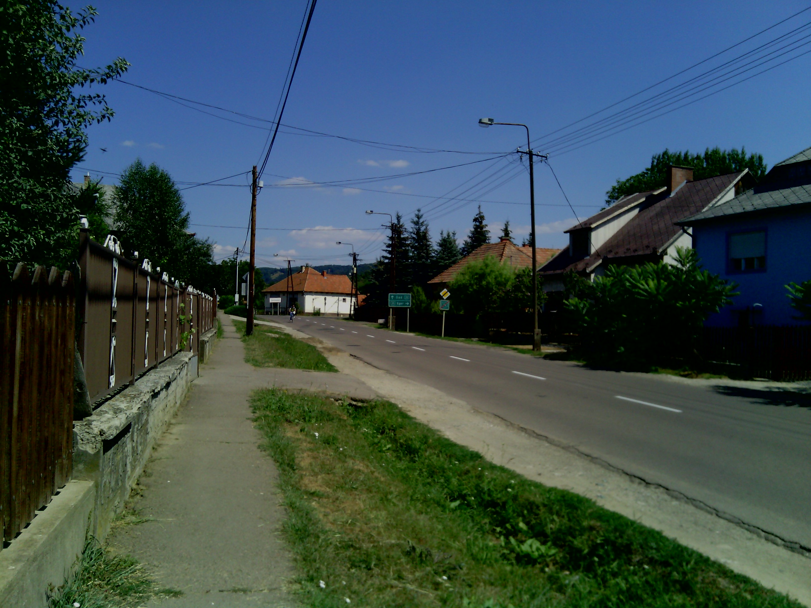 23-as főút vége Tarnalelesz faluban, Szabadság utcában